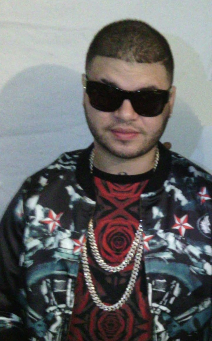 Farruko en un concierto en Río Chico, Venezuela el 21 de septiembre de 2014.